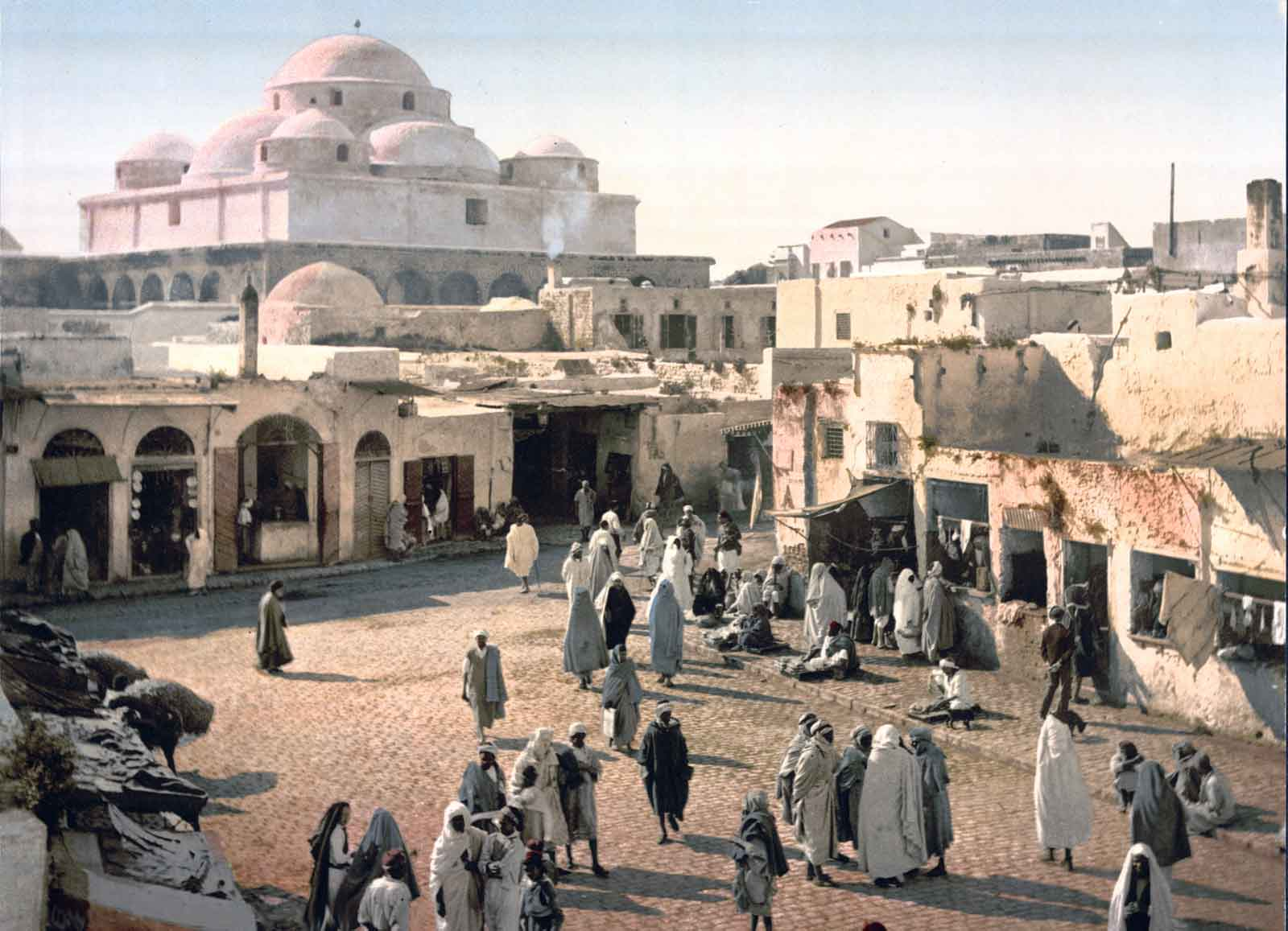 Place Bab Souika à Tunis en 1899 Collection personnelle Bertrand Bouret